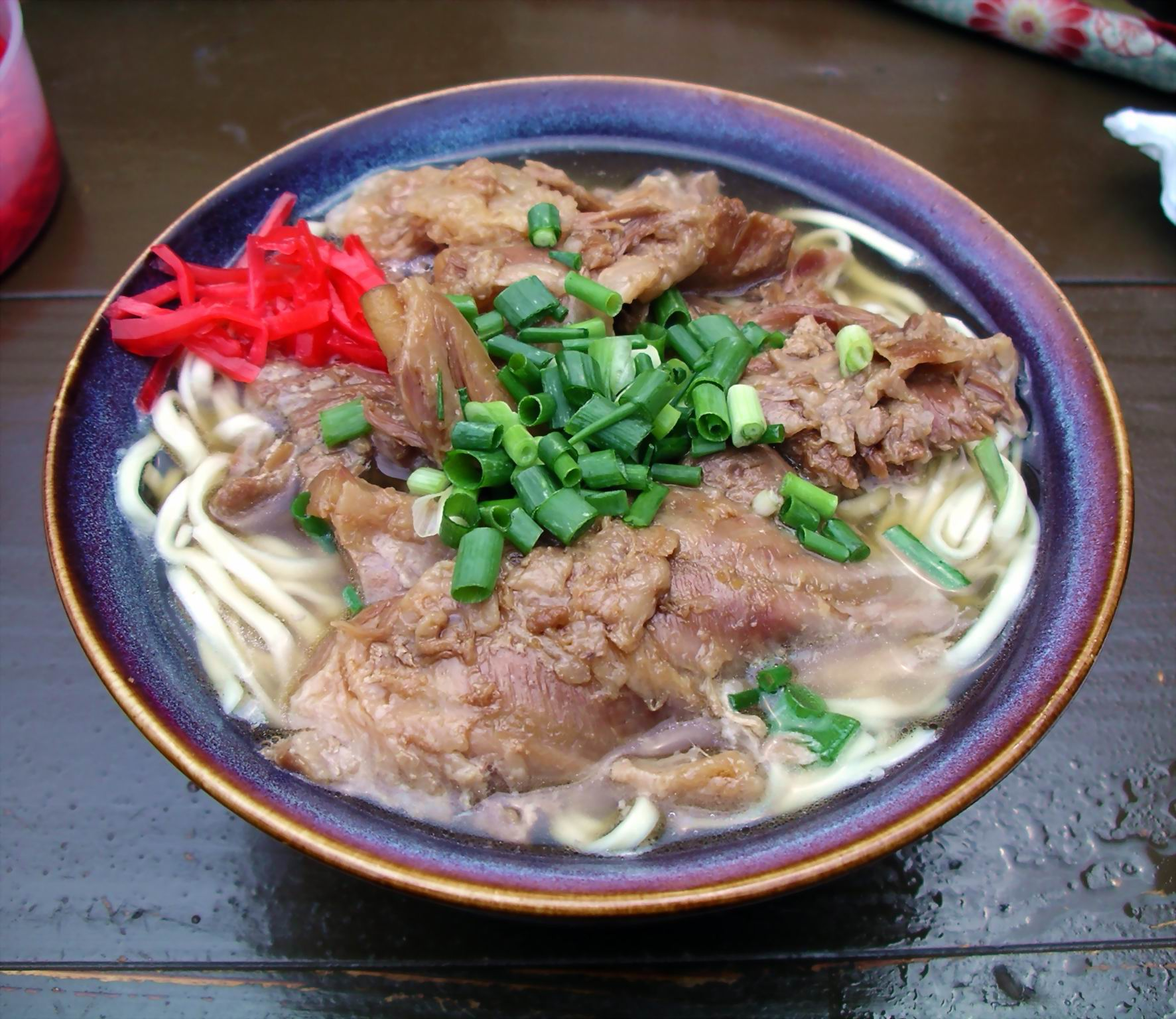 Nankotsu soba (Okinawa soba)亀かめそばの軟骨そば